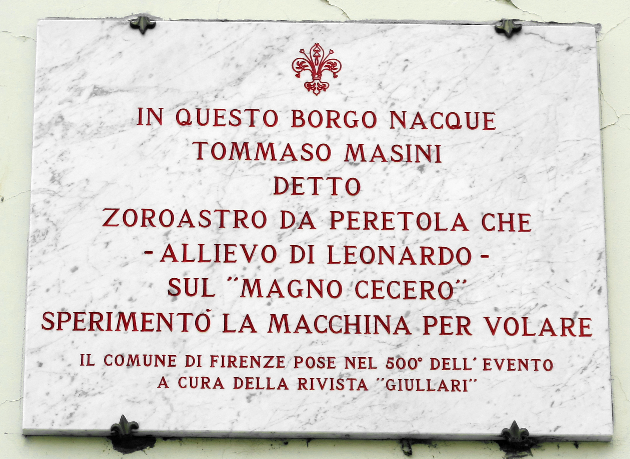 Firenze, miscellanea